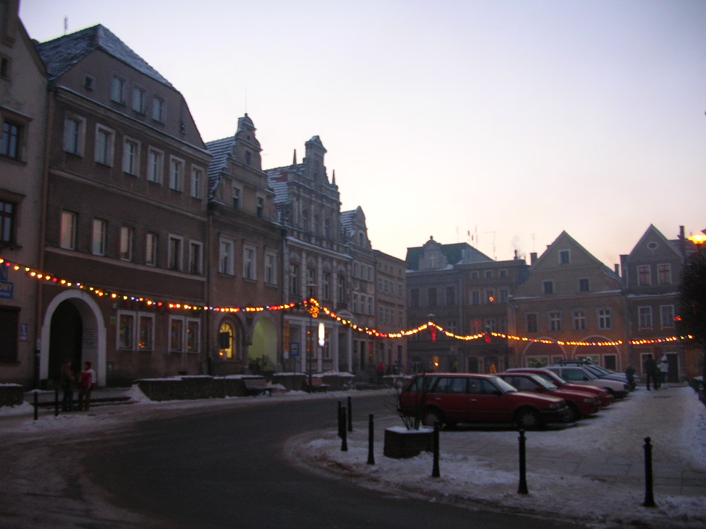 Gryfów Śląski - Rynek Autor - Bartek Wawraszko